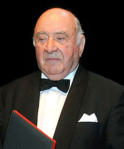 Anton Nanut, slovenski dirigent, na podelitvi Prešernovih nagrad leta 2011